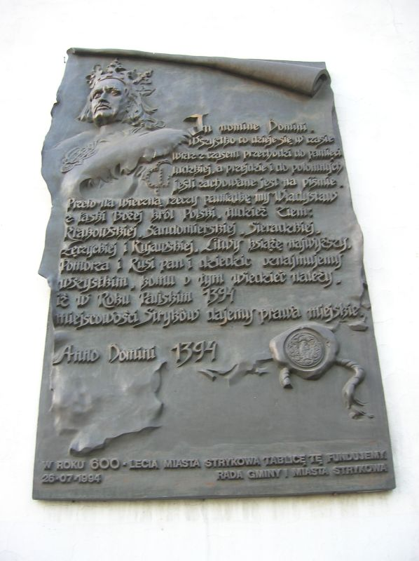 Stryków - tablica fundacji miasta.